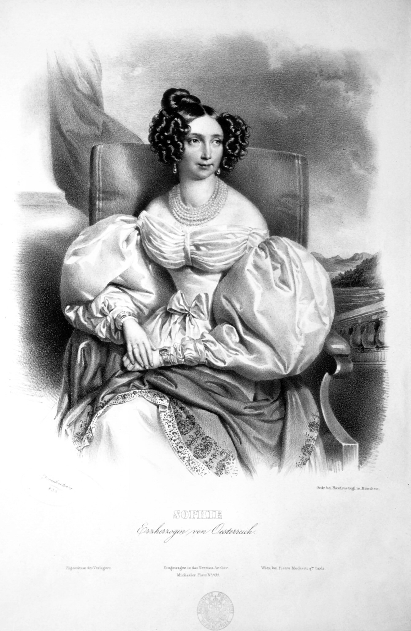 Erzherzogin Sophie von Österreich; Lithographie von Joseph Kriehuber, 1836